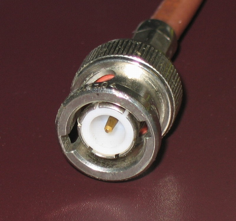 BNC connector